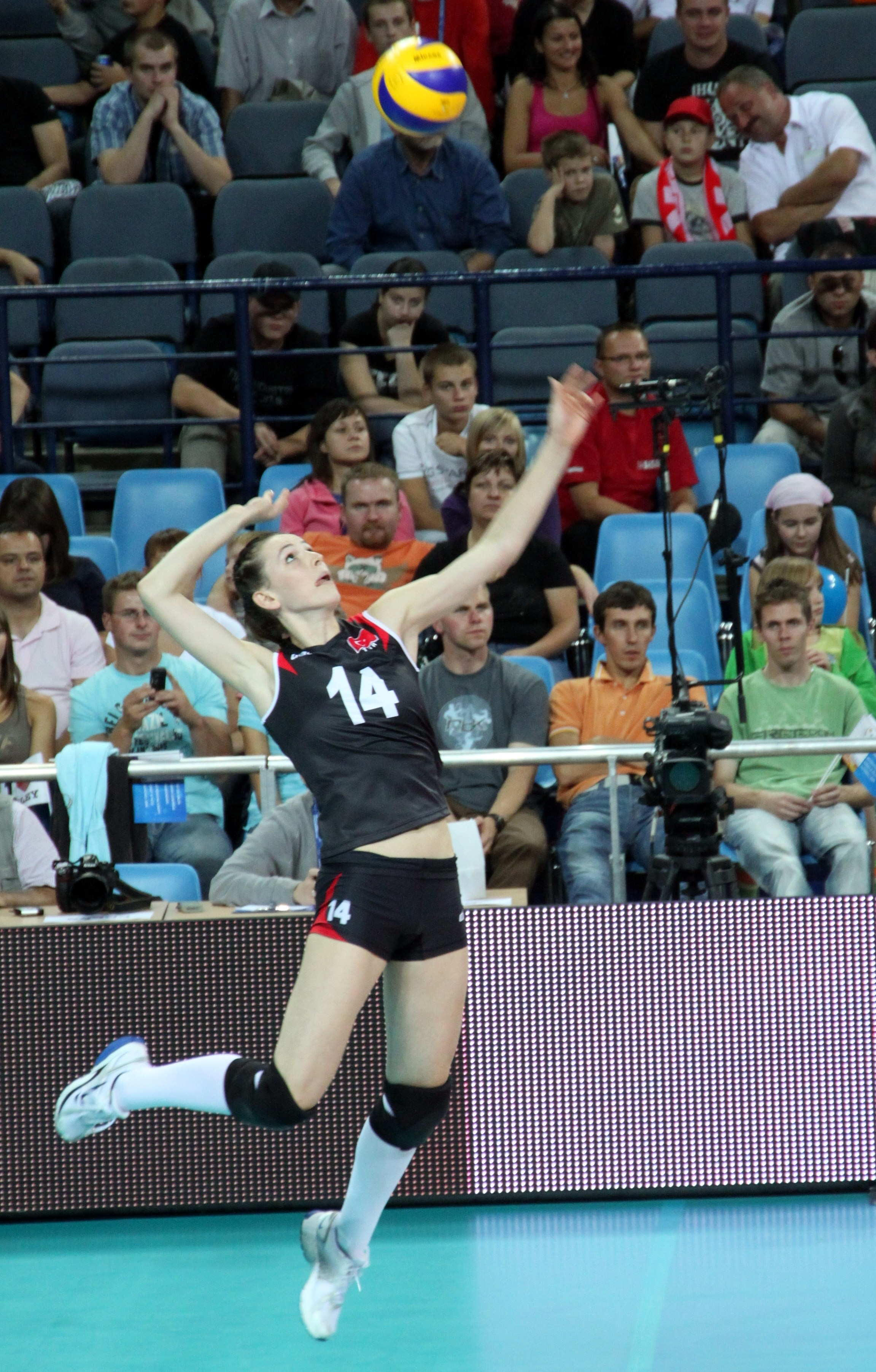 Turkish volleyball player Eda Erdem